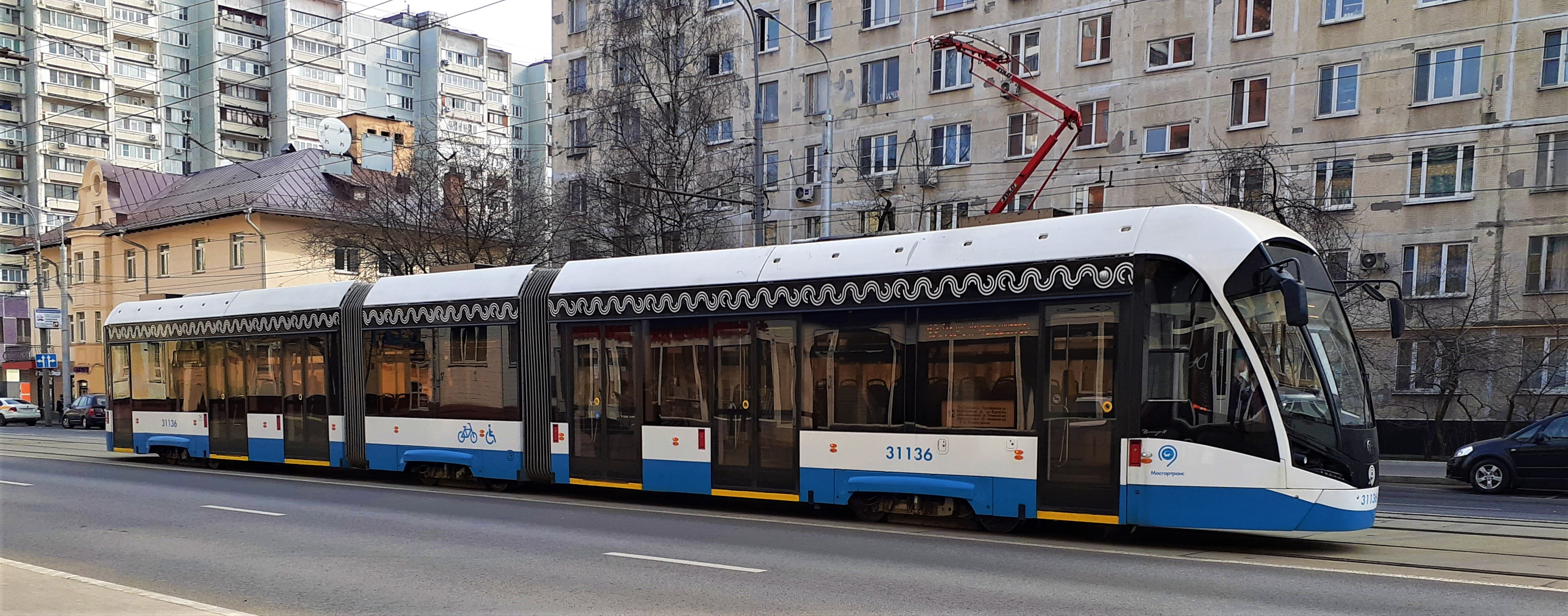 Трамвайный вагон 71-931М "Витязь-М" № 31136 на маршруте 12 в Москве